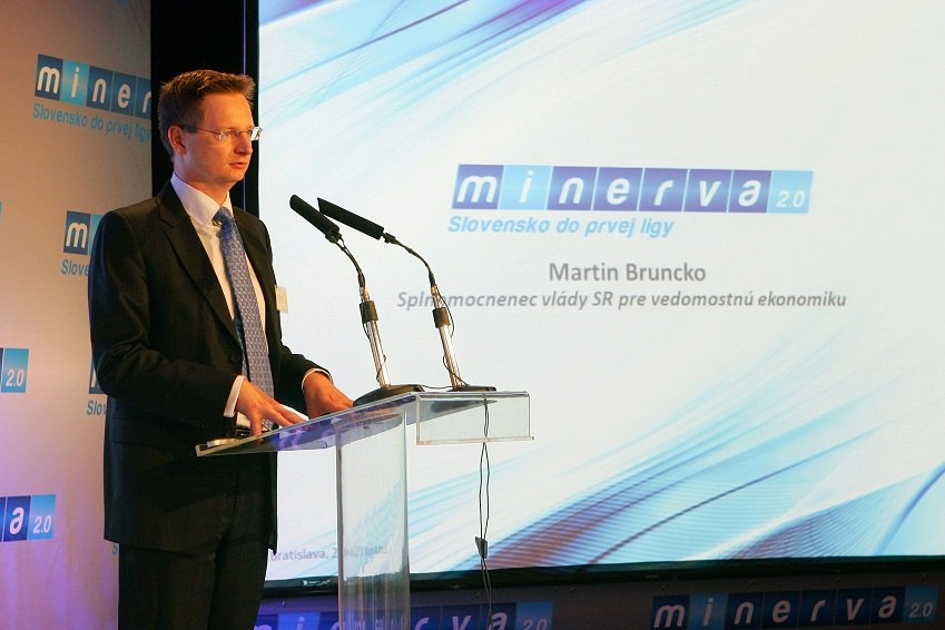 Splnomocnenec vlády pre vedomostnú ekonomiku M. Bruncko pri predstavovaní stratégie Minerva 2.0